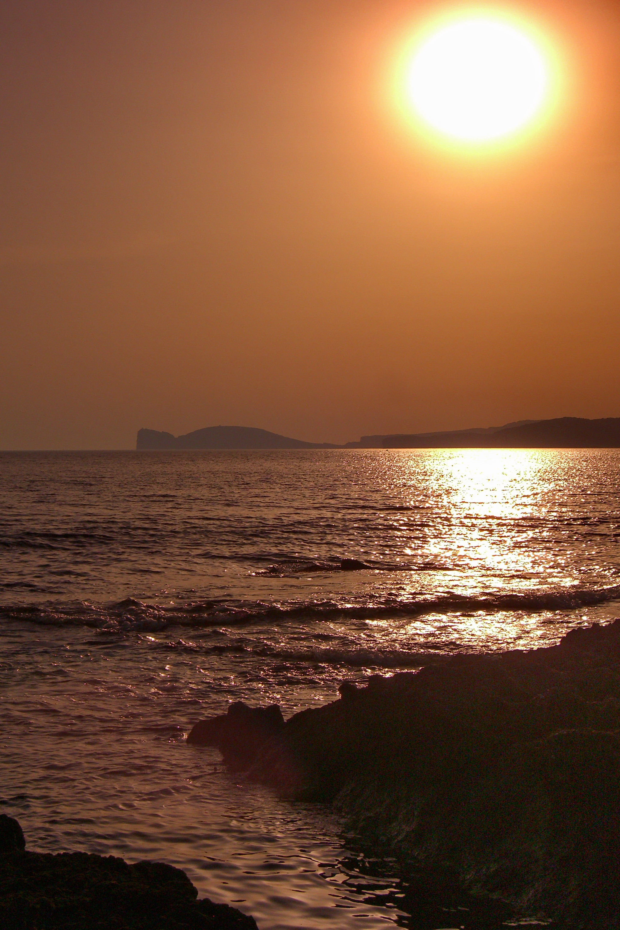 Panorama di Capo Caccia/ Località: Alghero/ Autore: Alessandro Angotzi/ Anno: 2006